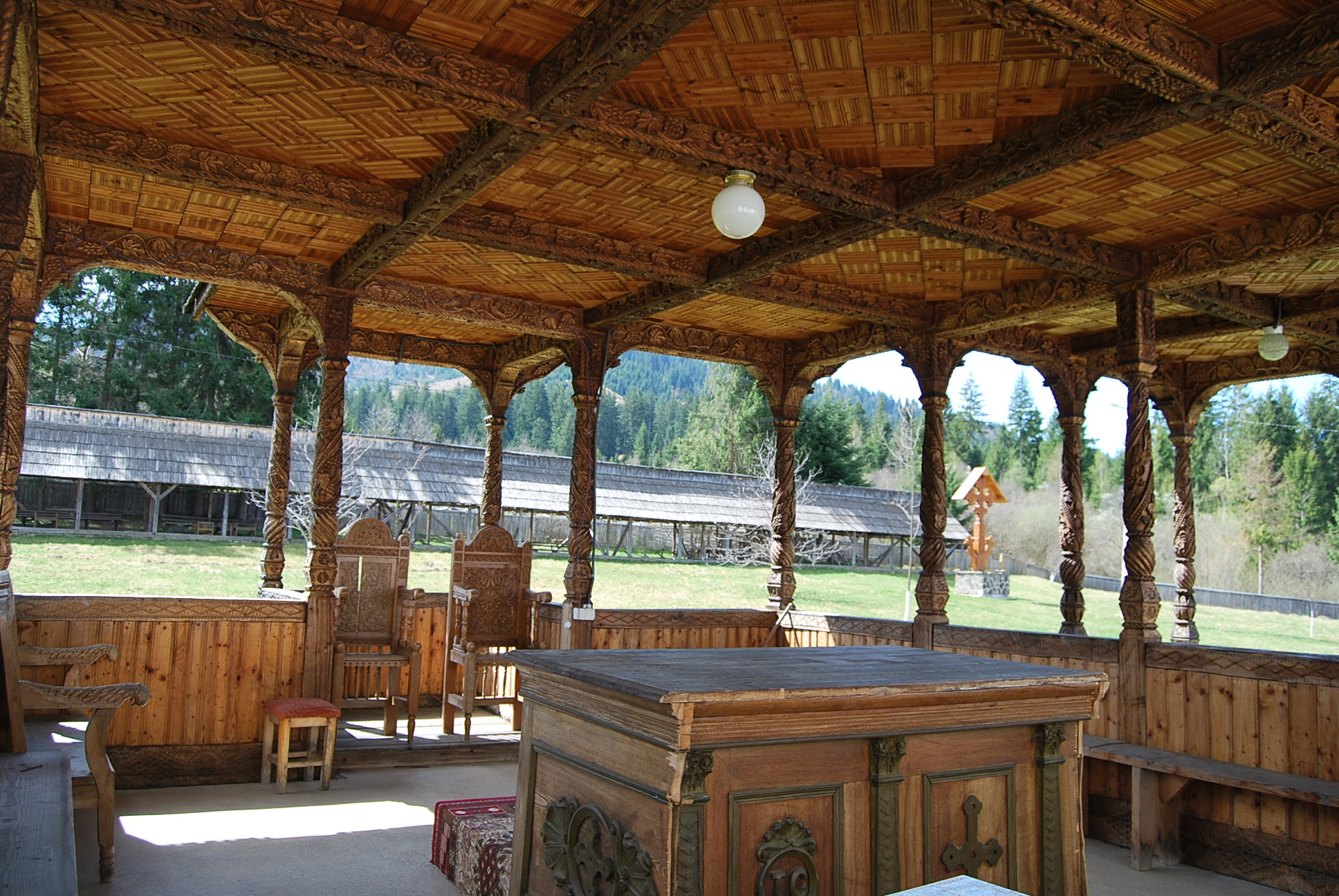 Interior altar de vară Mănăstirea Moisei